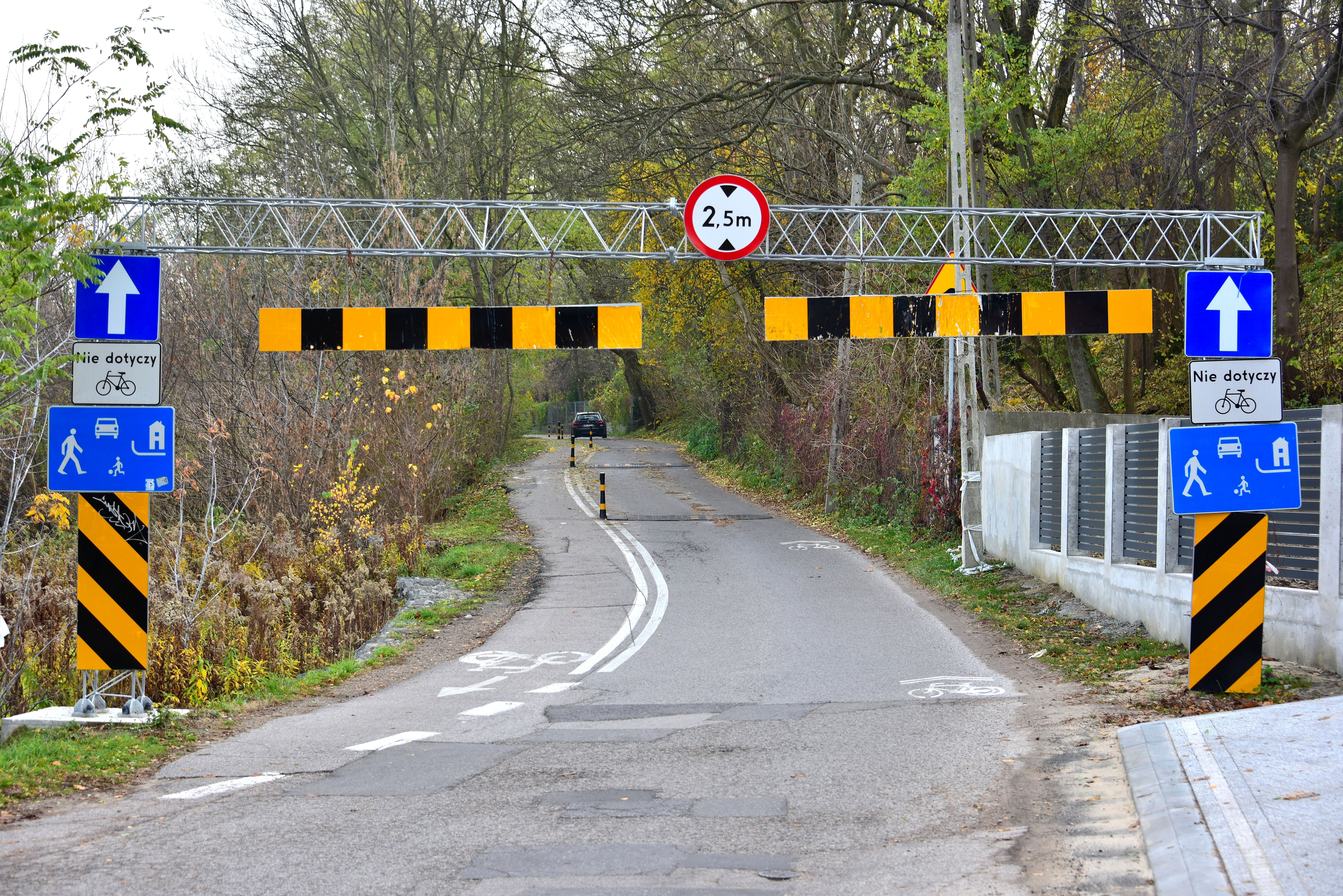 Ulica Orszady w Warszawie